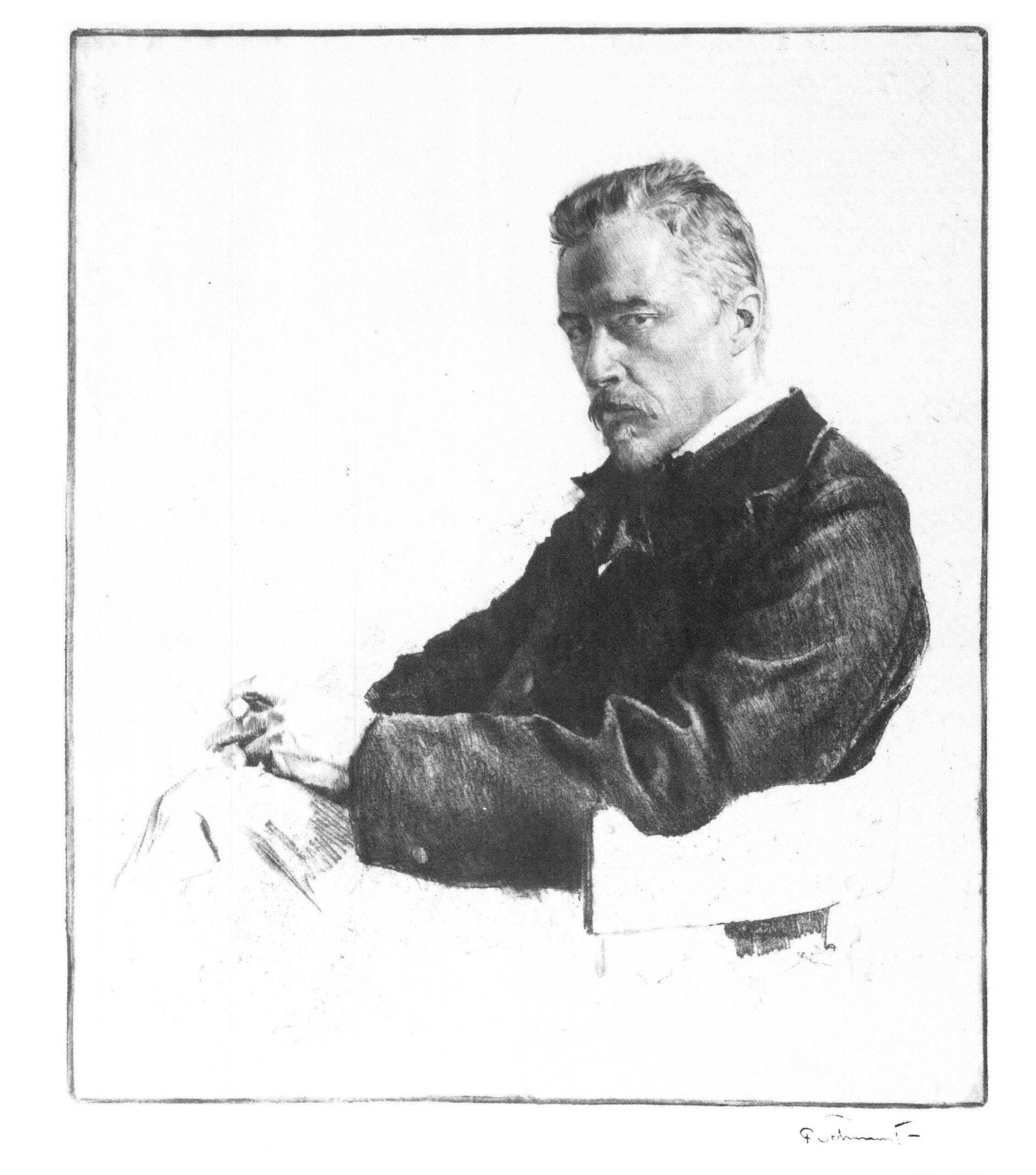 Kniestück des Komponisten Hugo Wolf, radiert von Ferdinand Schmutzer (1870-1928) nach einer Photographie. Originalgröße: 44,5x38,5cm. Schmutzer-Werkverzeichnis (von A. Weixlgärtner) Nr.236.